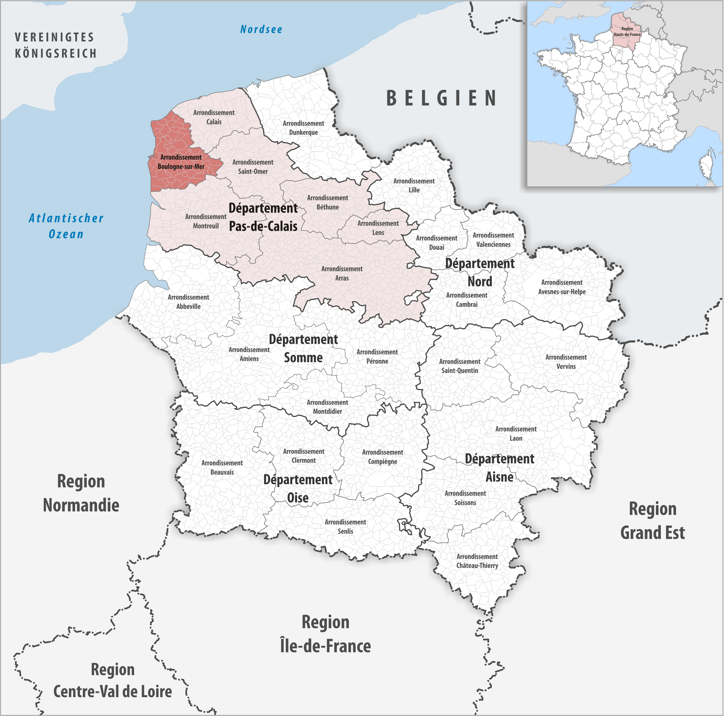 Lage des Arrondissements Boulogne-sur-Mer